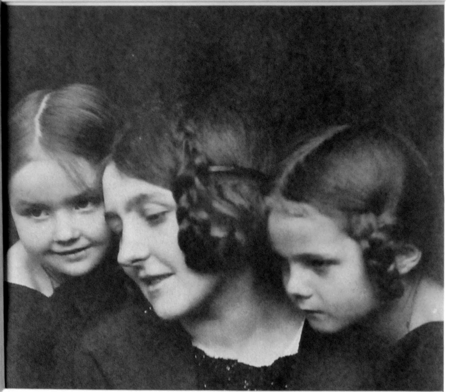 Schloss Tenneberg, Foto von Käthe Kruse, Puppenmuseum